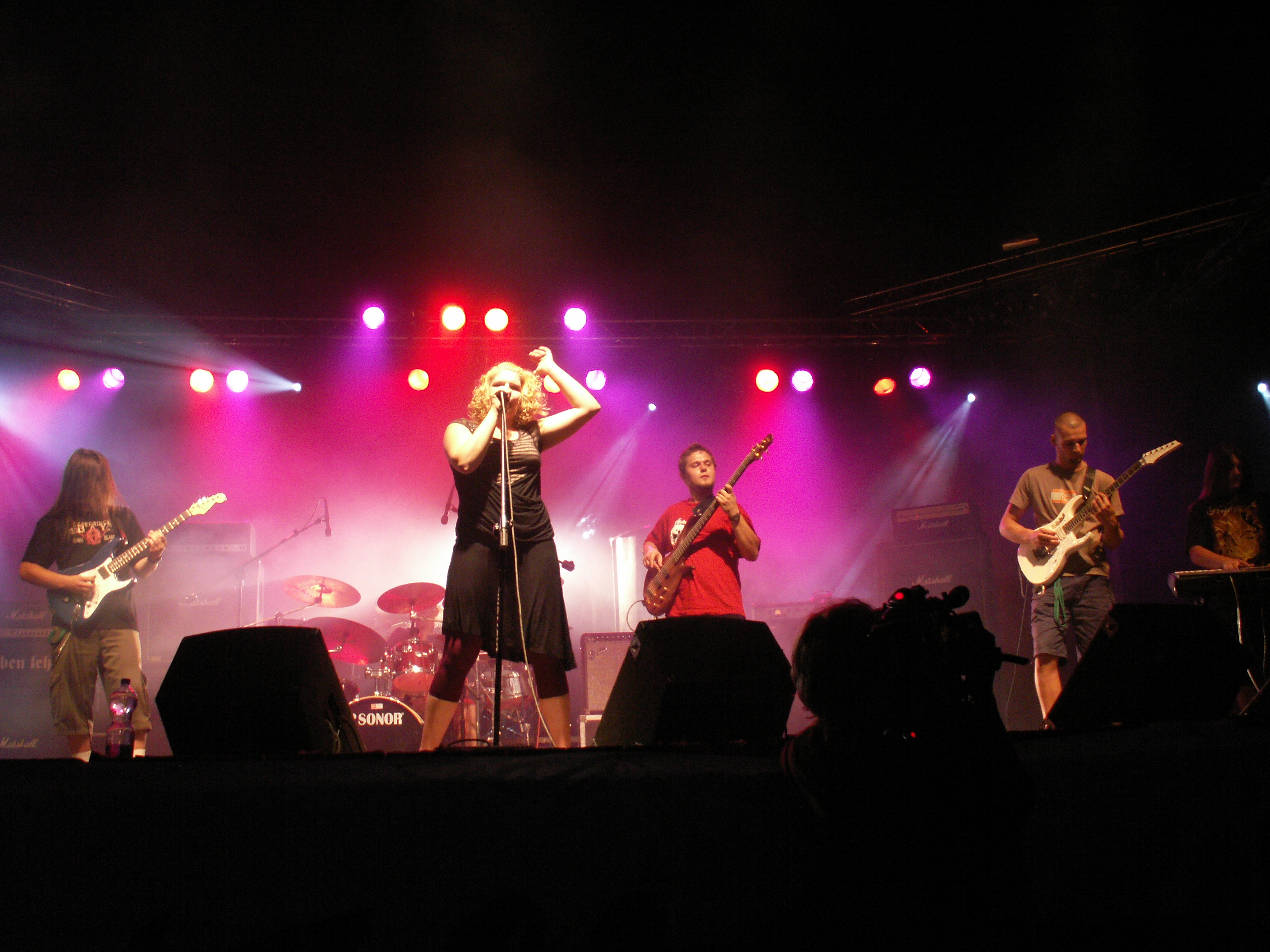 Беларуская (тарашкевіца): Гурт 5set5 на «Басовішчы-2007»